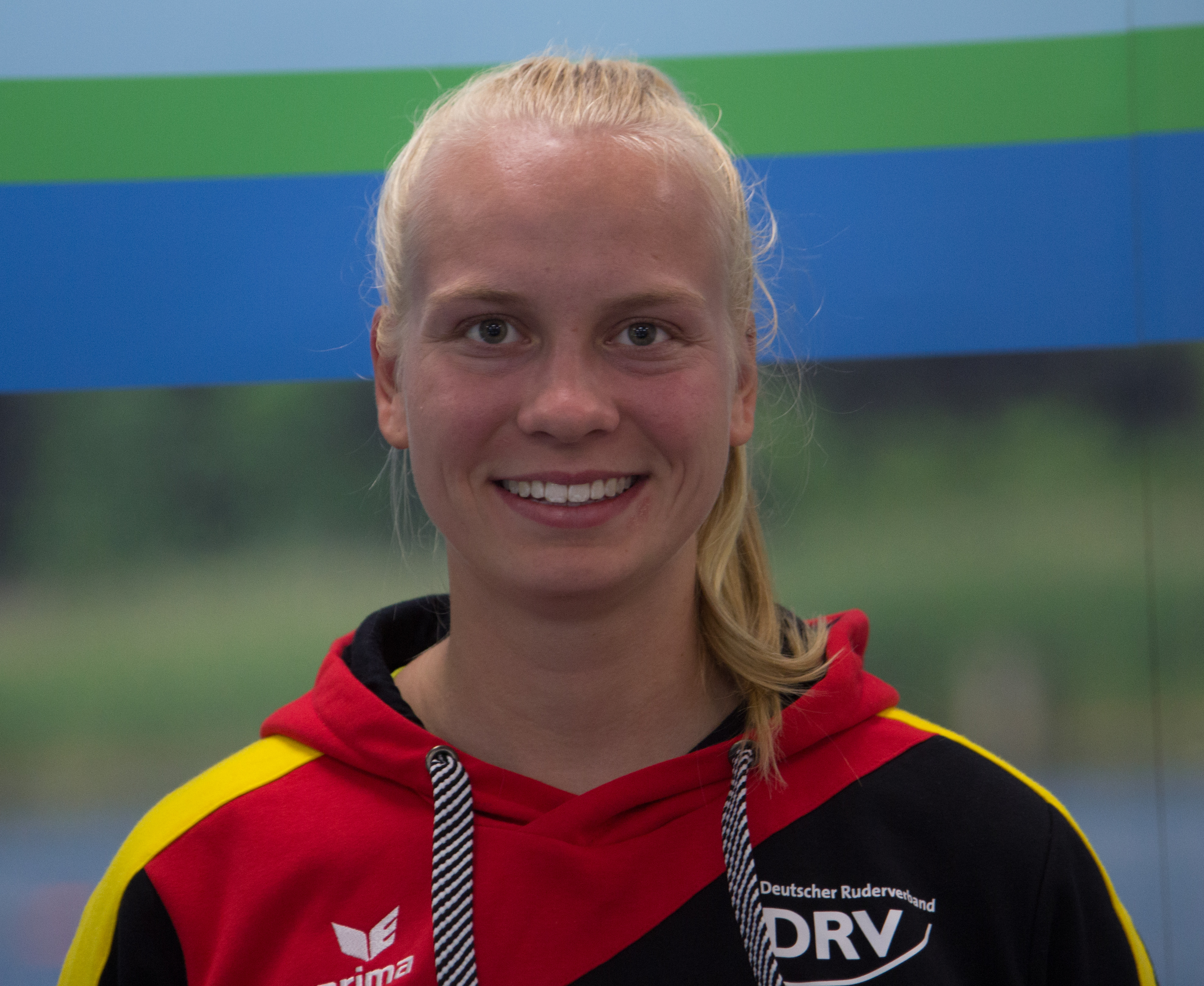 Frieda Hämmerling beim Medientag des Deutschen Ruderverbandes am 6. September 2017 in der Ruderakademie in Ratzeburg.